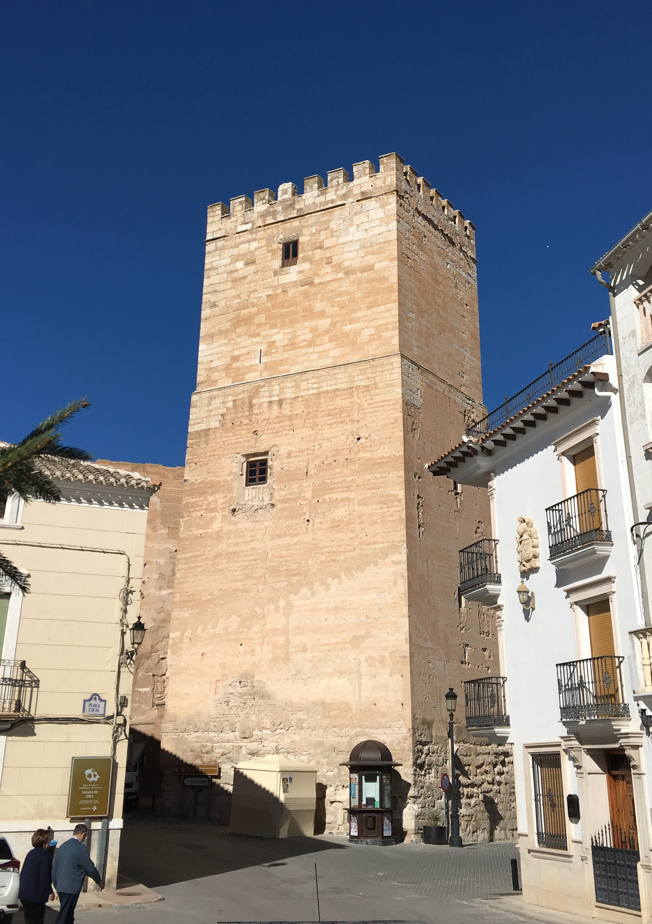 Orce